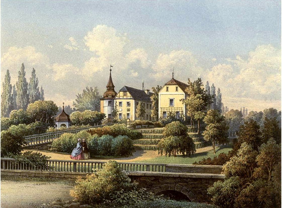 Schloss Adelsdorf, Kreis Goldberg-Hainau, Provinz Schlesien, Lithografie aus dem 19. Jahrhundert